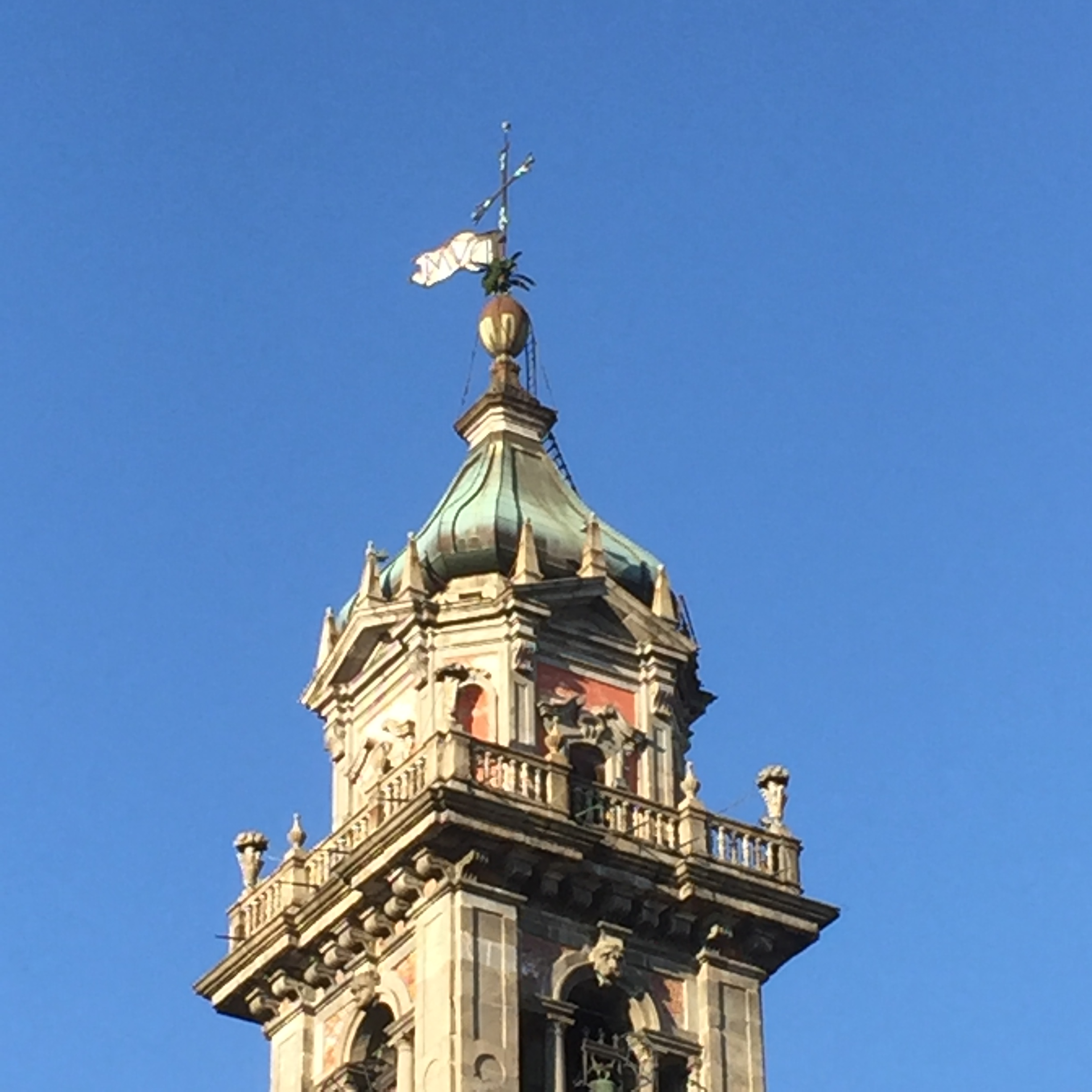 Varese - Campanile della Basilica di S. Vittore - lanterna